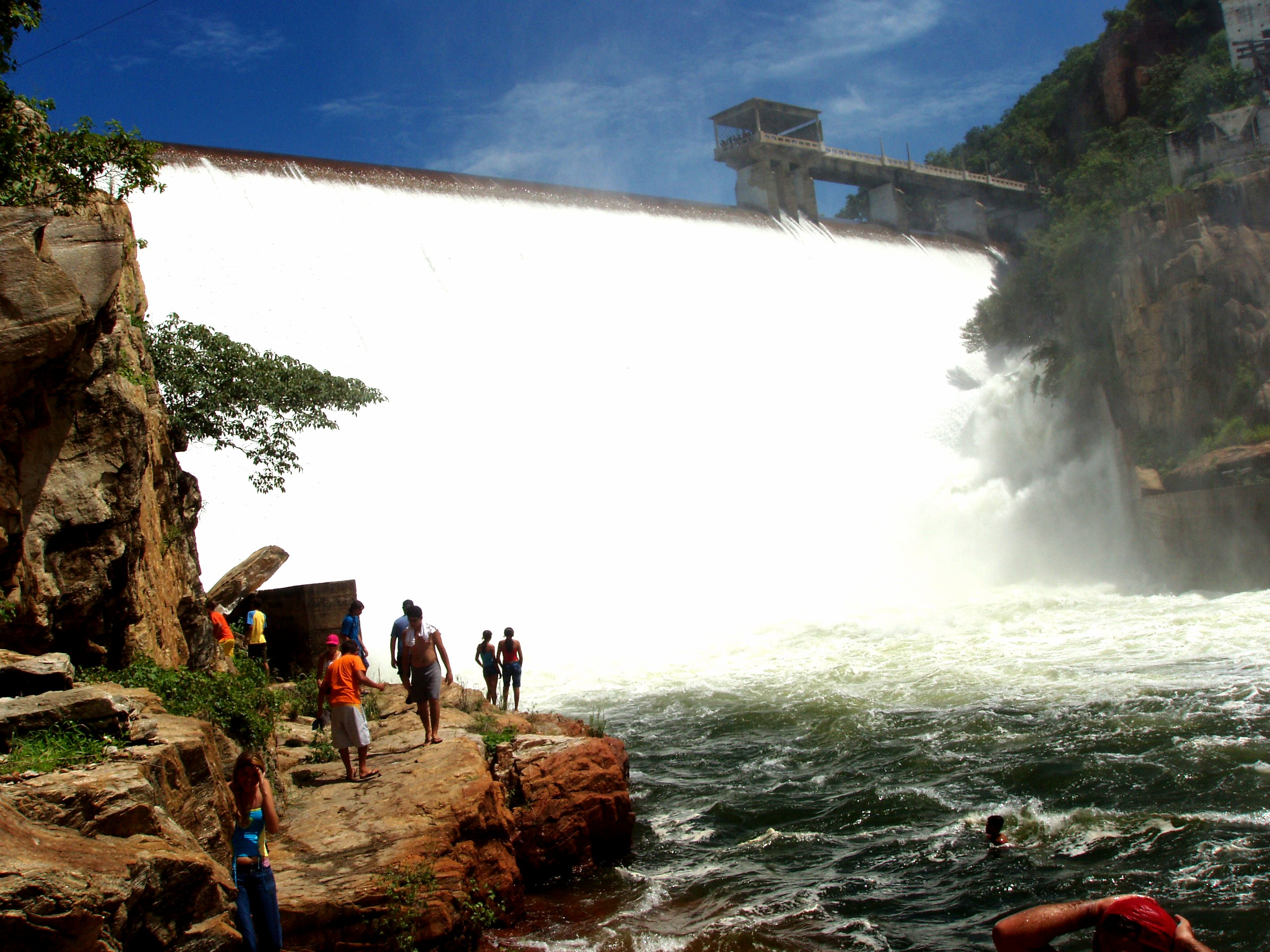 Açude do Município de Coremas, na Paraíba, Brazil.